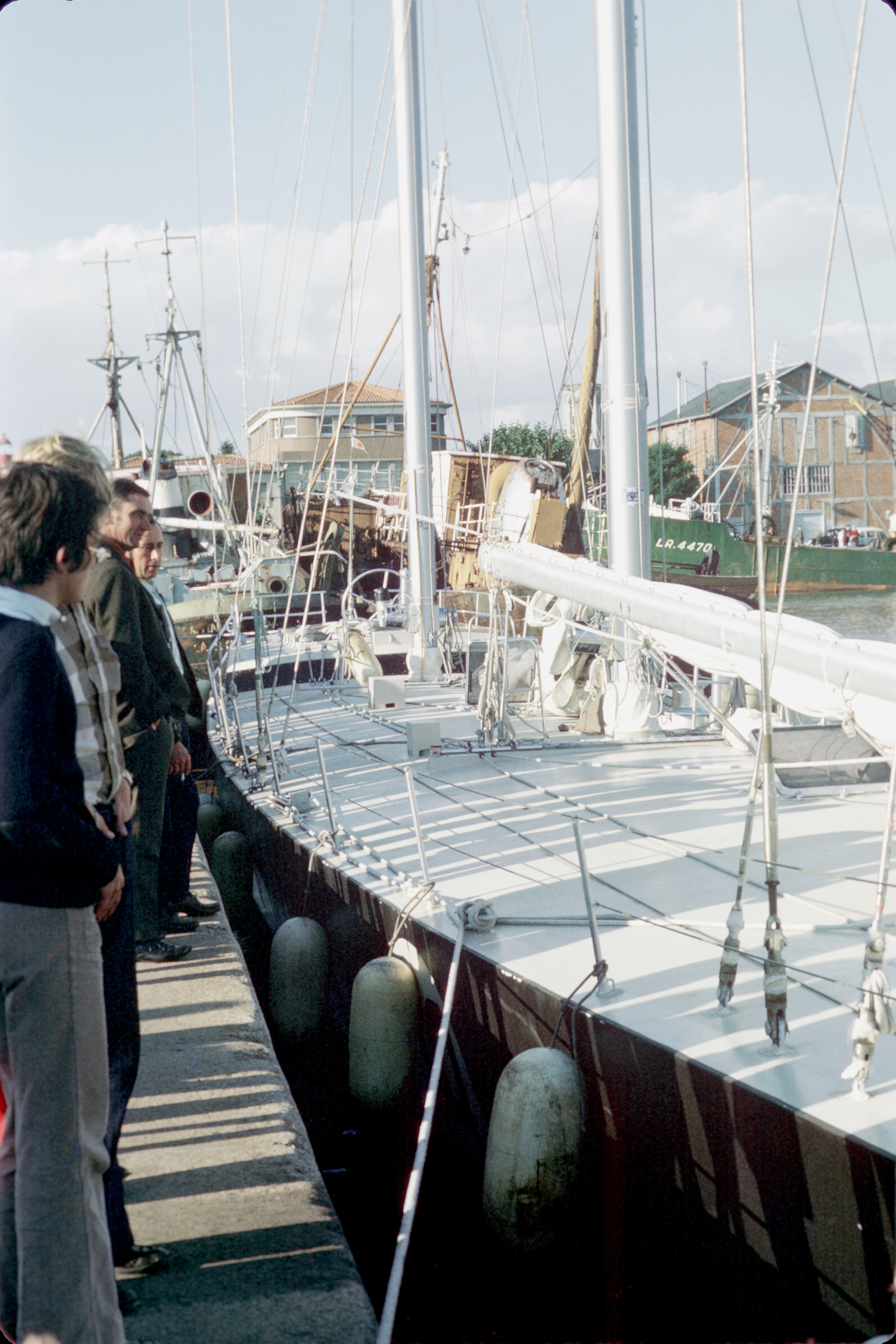 "Vendredi 13" dans le Bassin des Chalutiers à La Rochelle. Le pont du bateau. Le voilier de course à trois mâts "Vendredi 13" a été construit spécialement pour la Transat Anglaise de 1972. Il a été ensuite utilisé comme voilier de croisière dans les Antilles avant d' être offert à l' ancien musée de la plaisance de Bordeaux. La Rochelle, Charente Maritime, France.